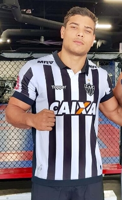 Paulo Borrachinha em treinamento nos Estados Unidos